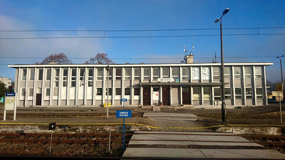 Dworzec w Nidzicy, listopad 2016